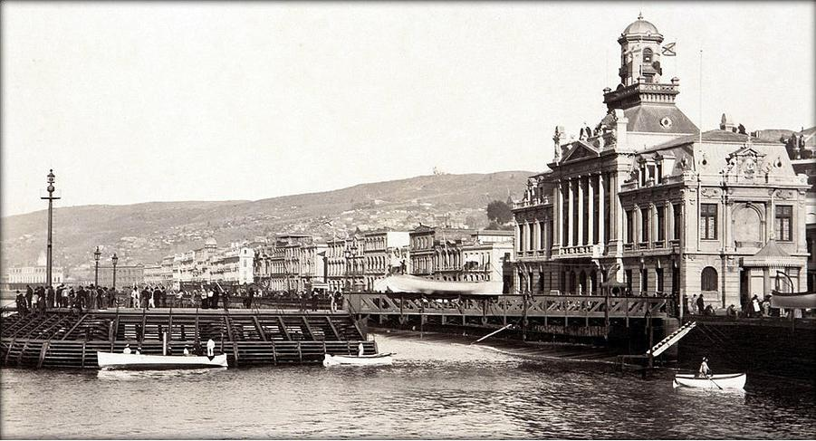 Fotos históricas de Valparaíso en Chile